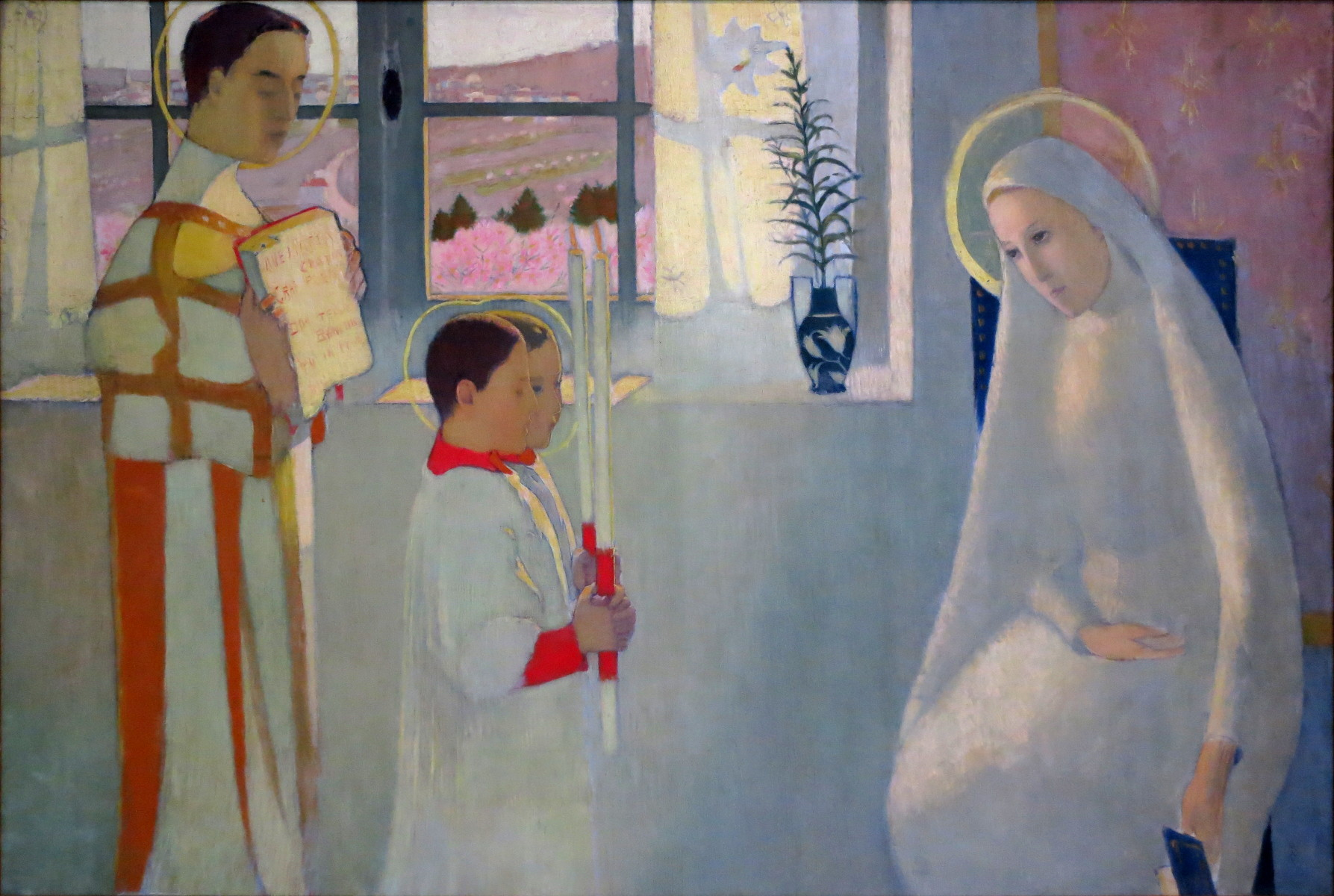 Le mystère catholiquetitle QS:P1476,fr:"Le mystère catholique" label QS:Lfr,"Le mystère catholique"